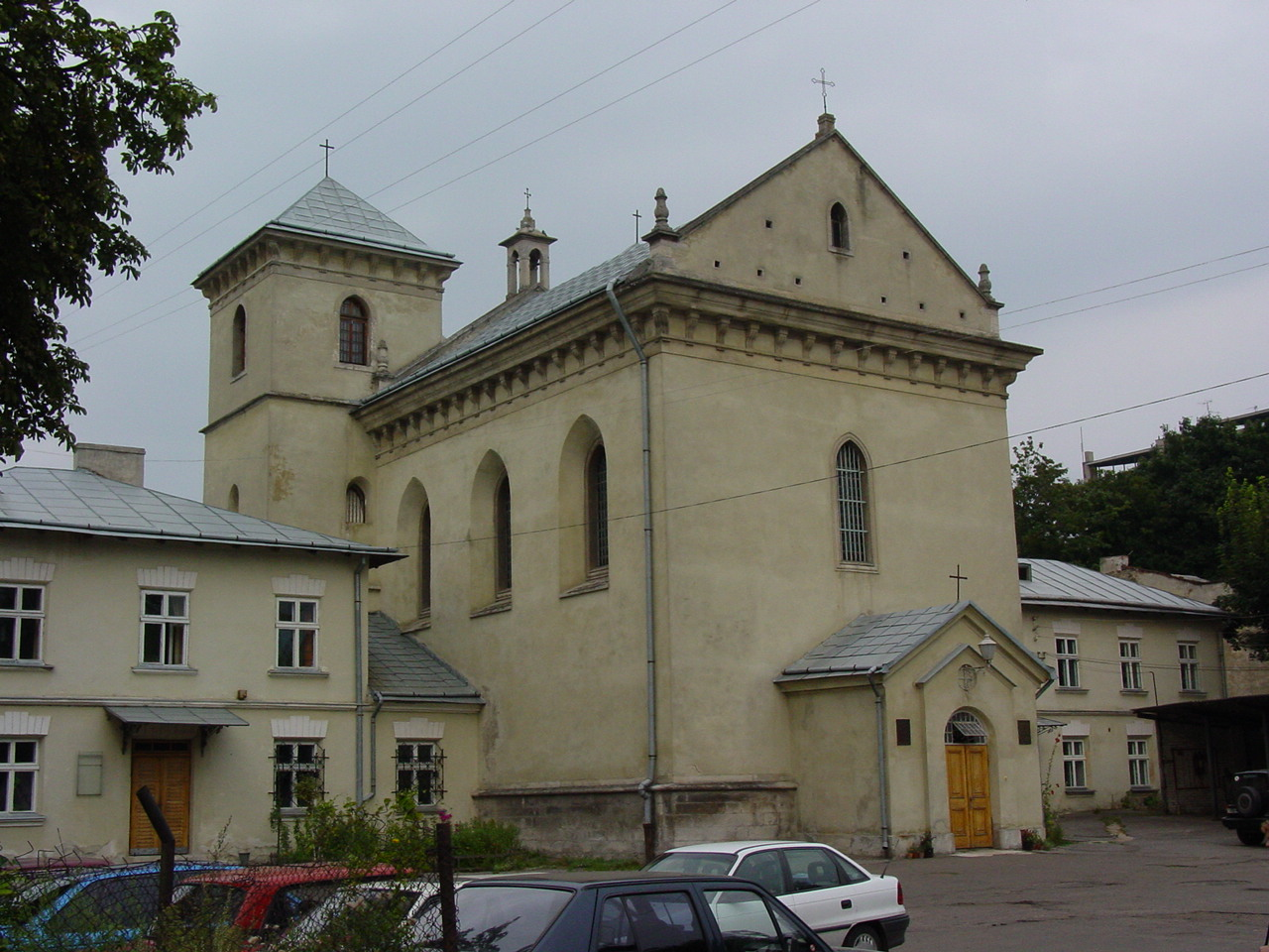 Kościół św. Łazarza we Lwowie